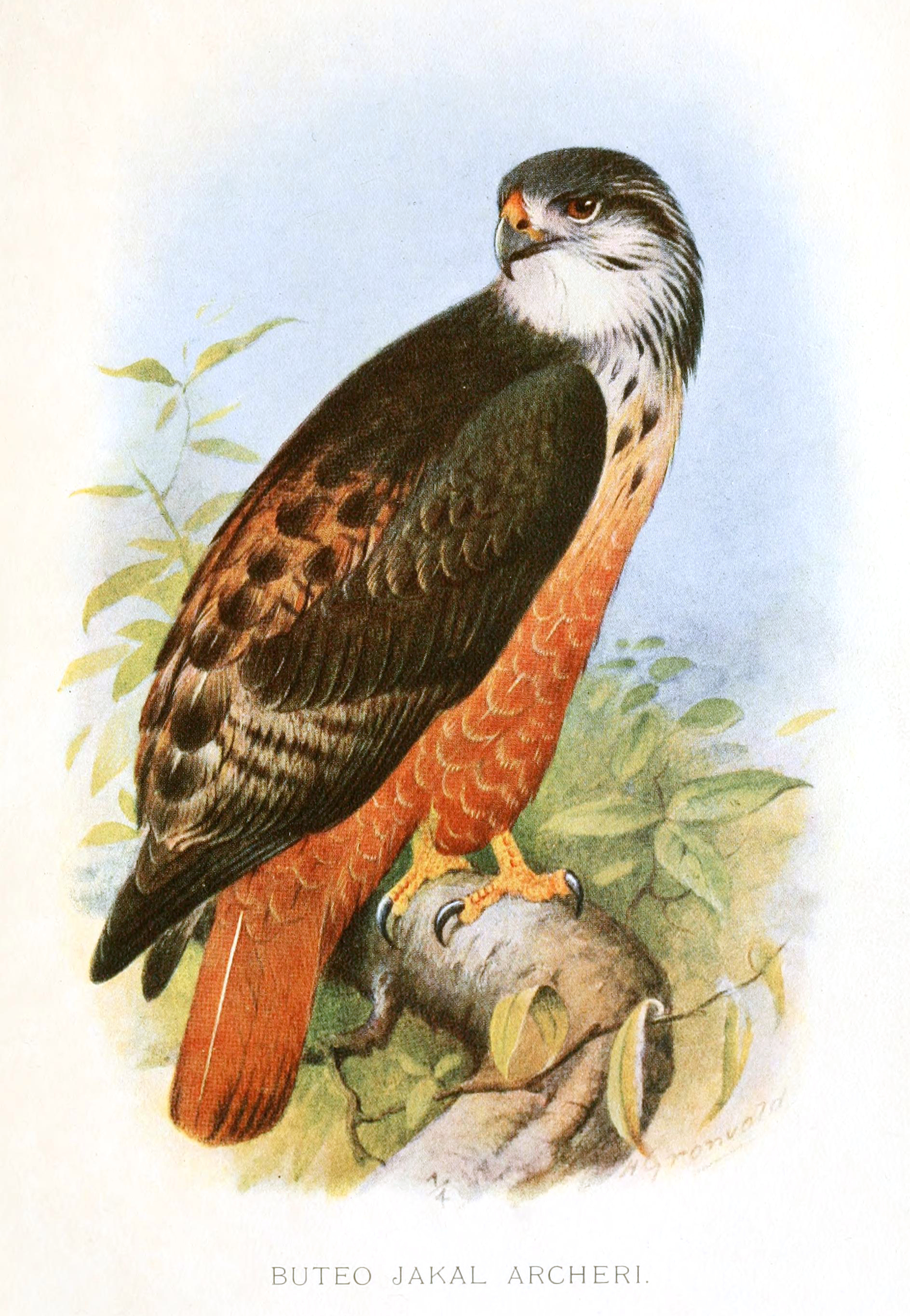 Buteo archeri